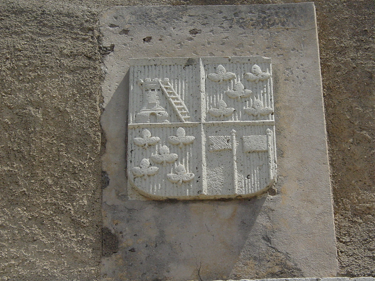 Al Jadid (Marzagão). Cidade de Marzagão fundada pelos portugueses em 1513 no sítio de uma fortaleza Almohad. Abandonada pelos portugueses em 1769 na sequência de um cerco do sultão Sidi Mohamed ben Abdallah. Armas de Luís de Loureiro (carta de brasão de 1551).